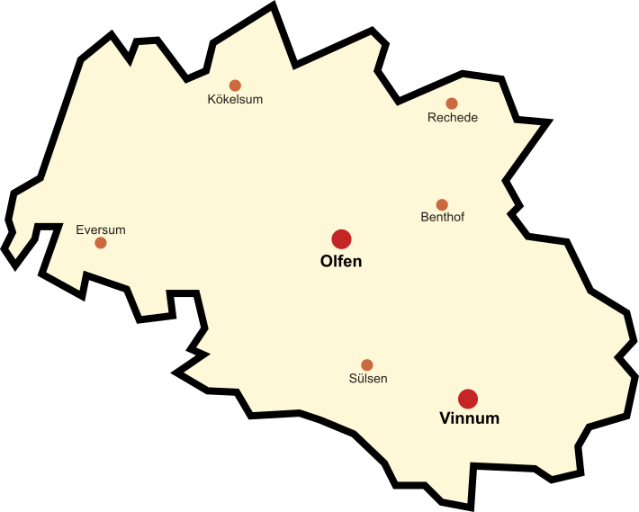 Ortsteile (rot) und Bauerschaften (orange) von Olfen